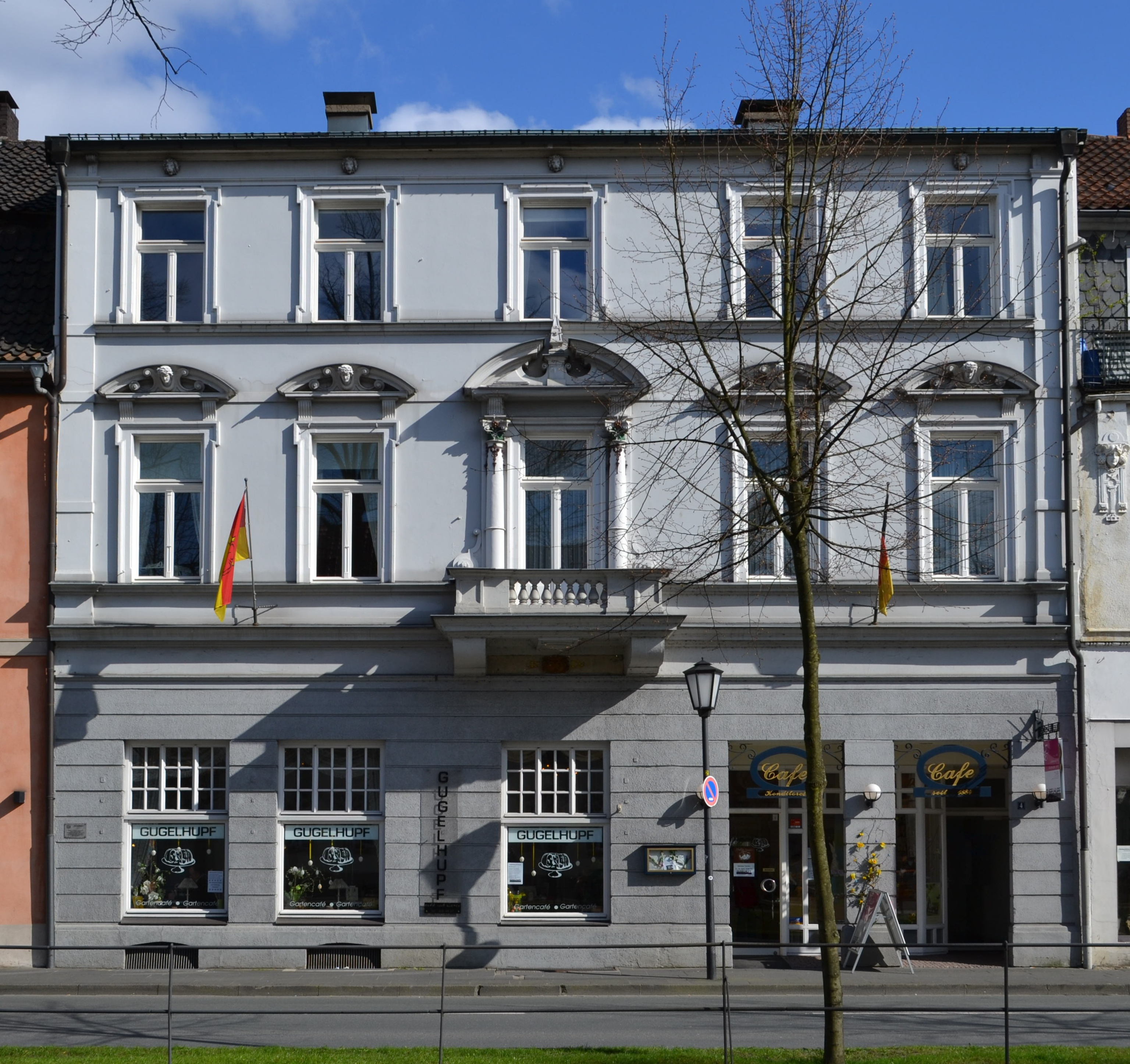 Baudenkmal Detmold Nr. 122 - Reihenwohnhaus in der barocken Neustadt Neustadt 4